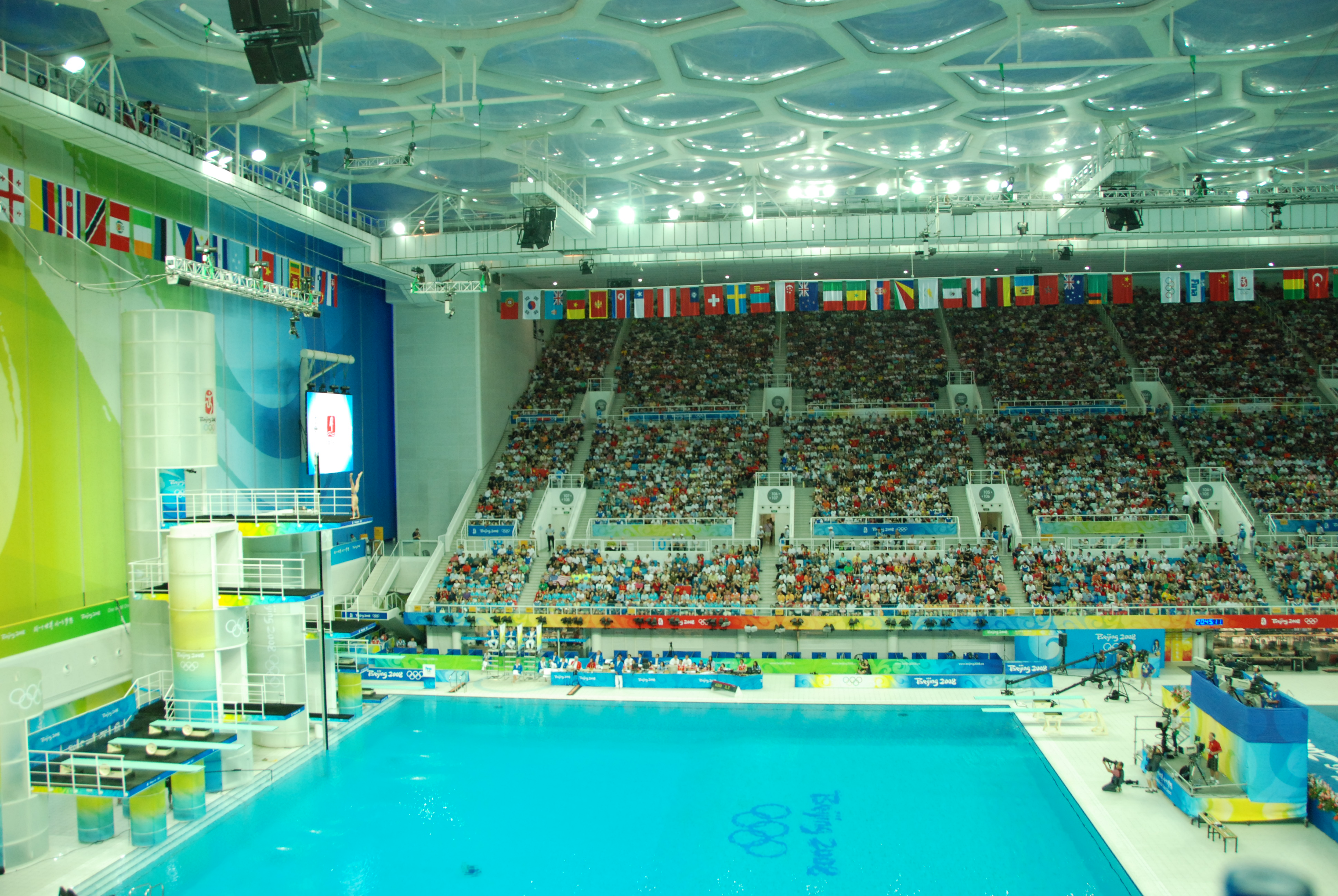 Competición de salto de trampolín, Beijing 2008